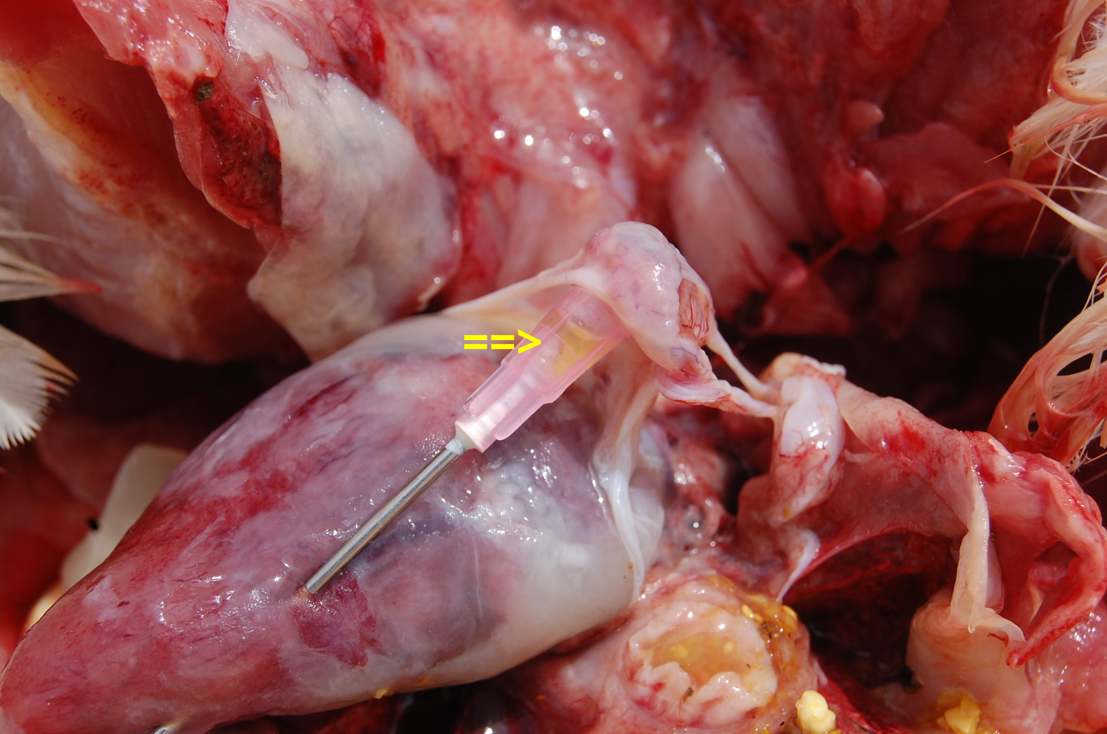 Walon: Colera des poyes: aiwe dins l' saetch do cour